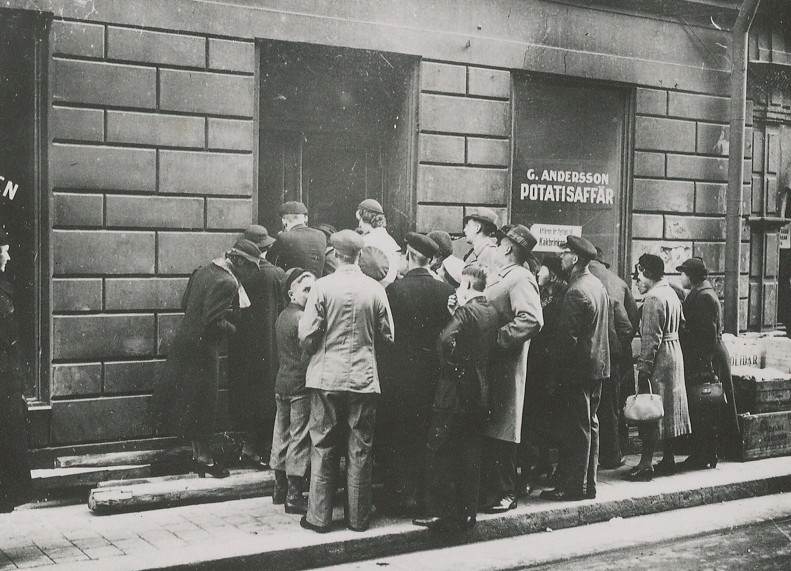 Lilla Nygatan 5: Sensationellt skattfynd i Gamla Stan